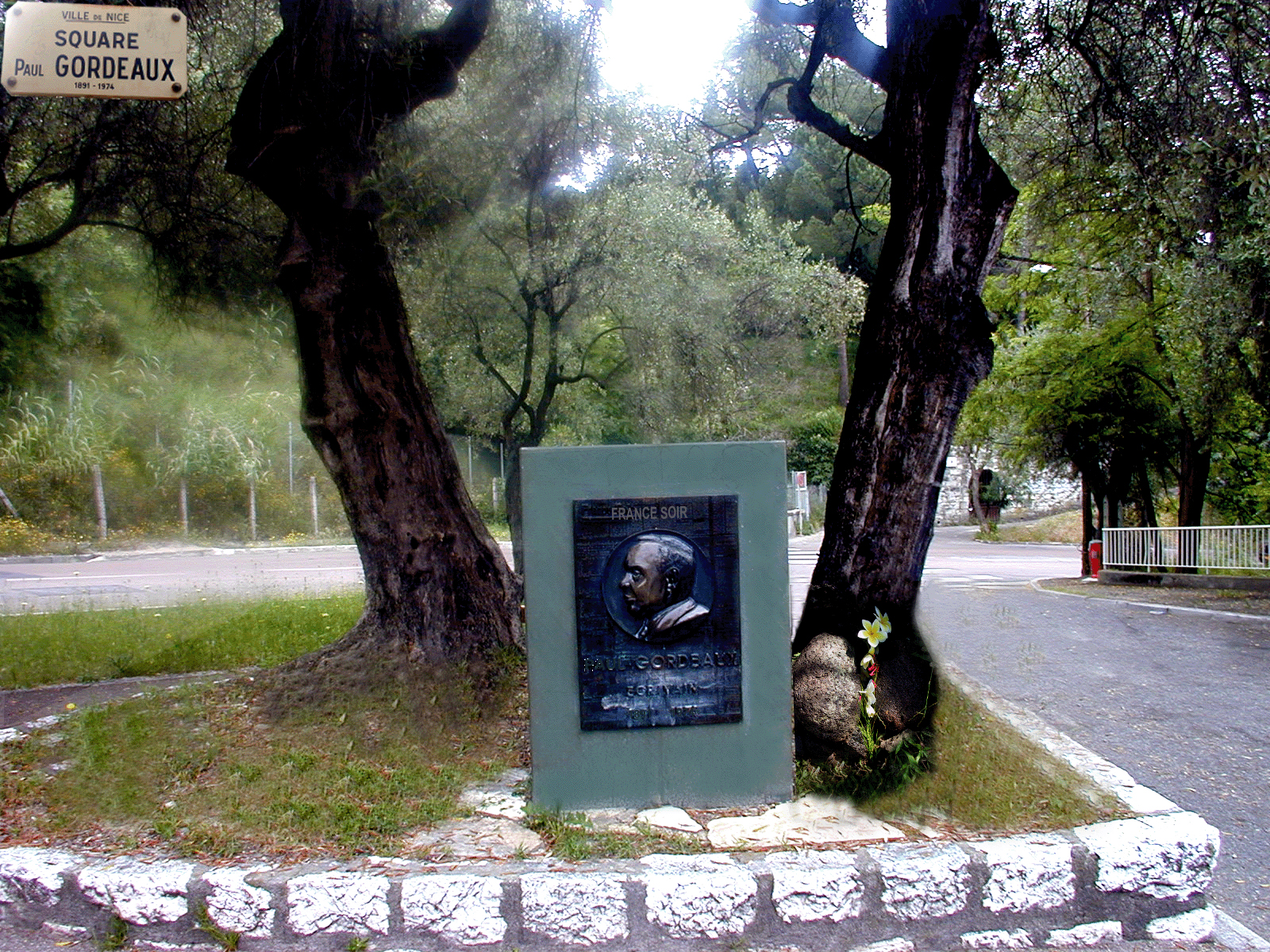 Square Paul Gordeaux (1891-1974) à Nice.